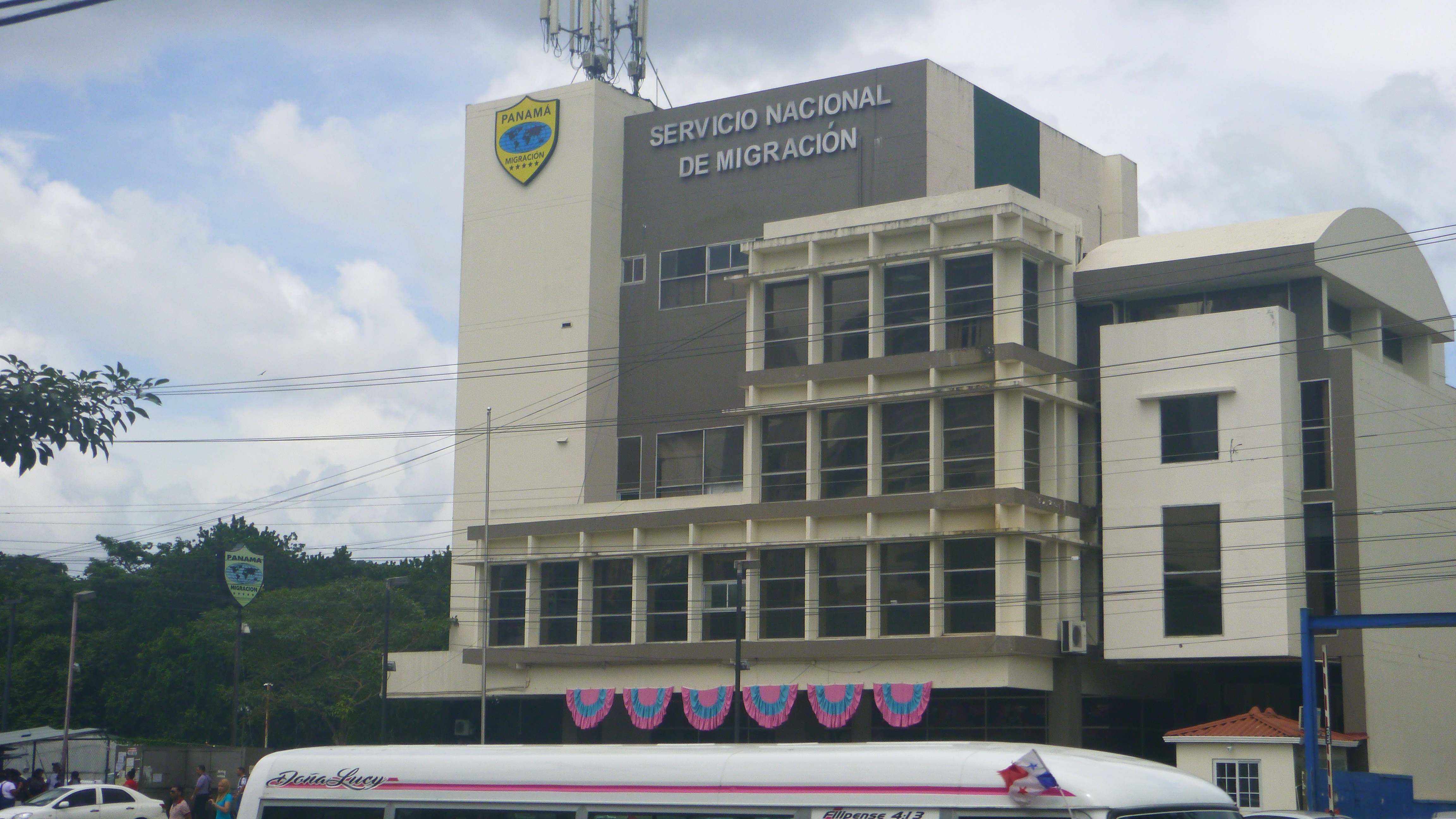 Sede del Servicio Nacional de Migración de Panamá en la Avenida Ricardo J Alfaro.